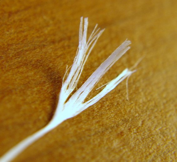 Dental floss - a split end